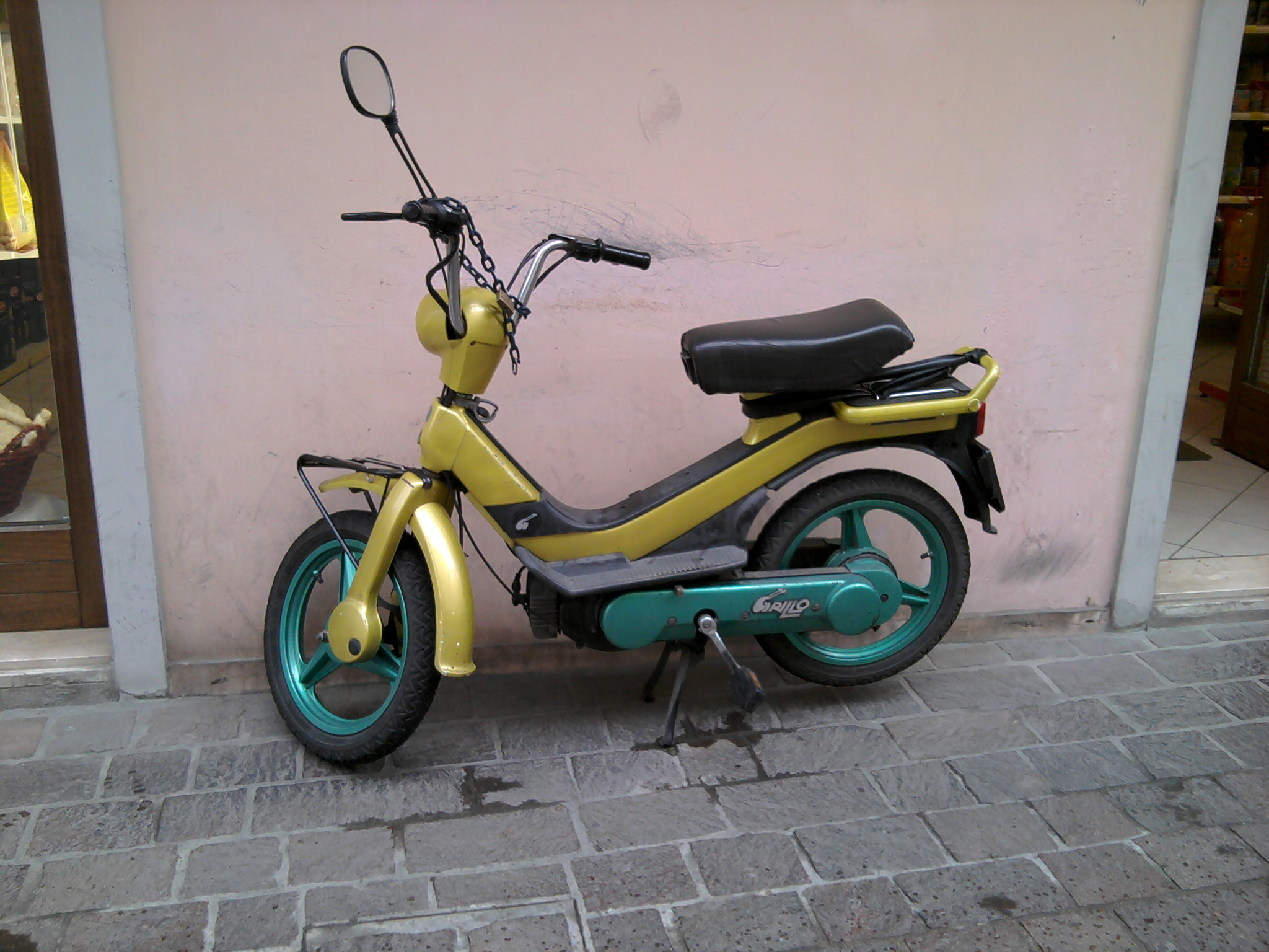 Un ciclomotore Piaggio Grillo fotografato a Rovigo.